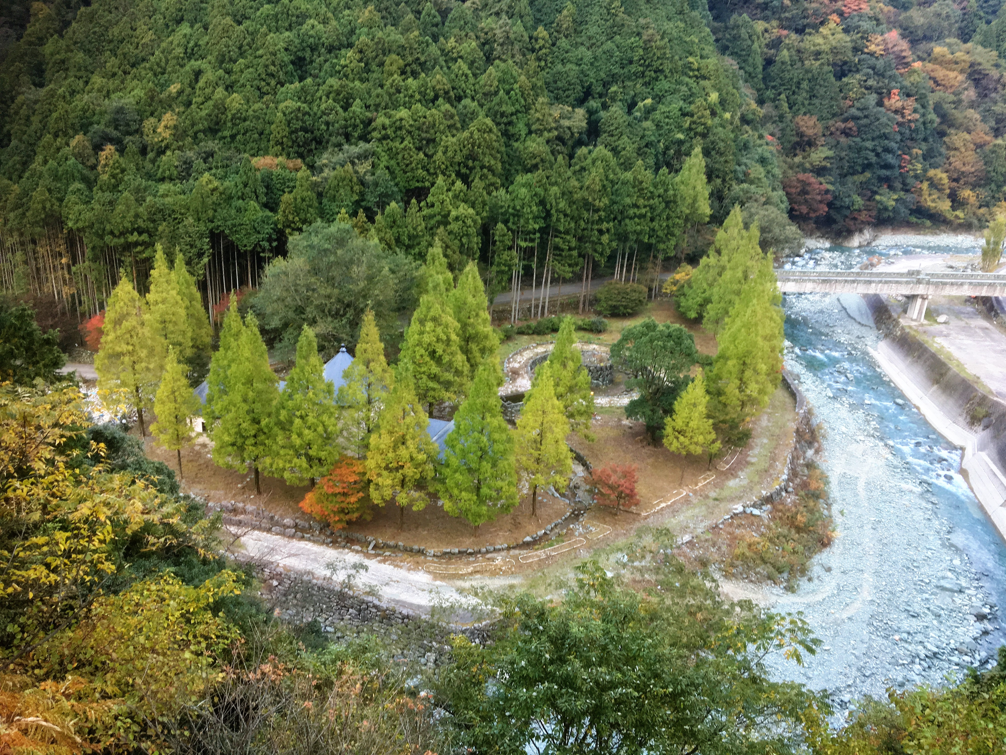 石鎚芸術村チロルの森の建造物